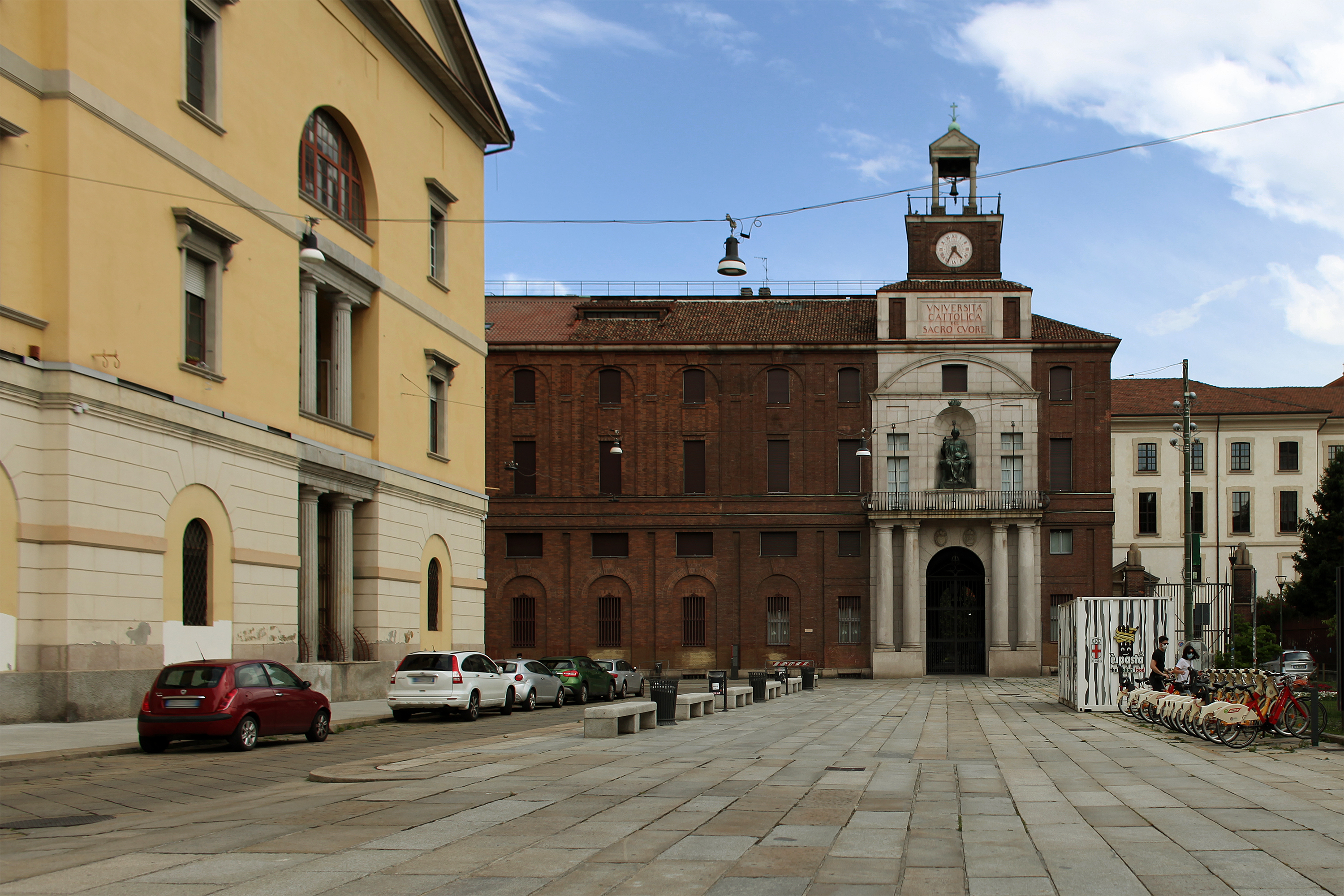 Ingresso della Università Cattolica di Milano visto da piazza Sant'Ambrogio; a sinistra la caserma Garibaldi